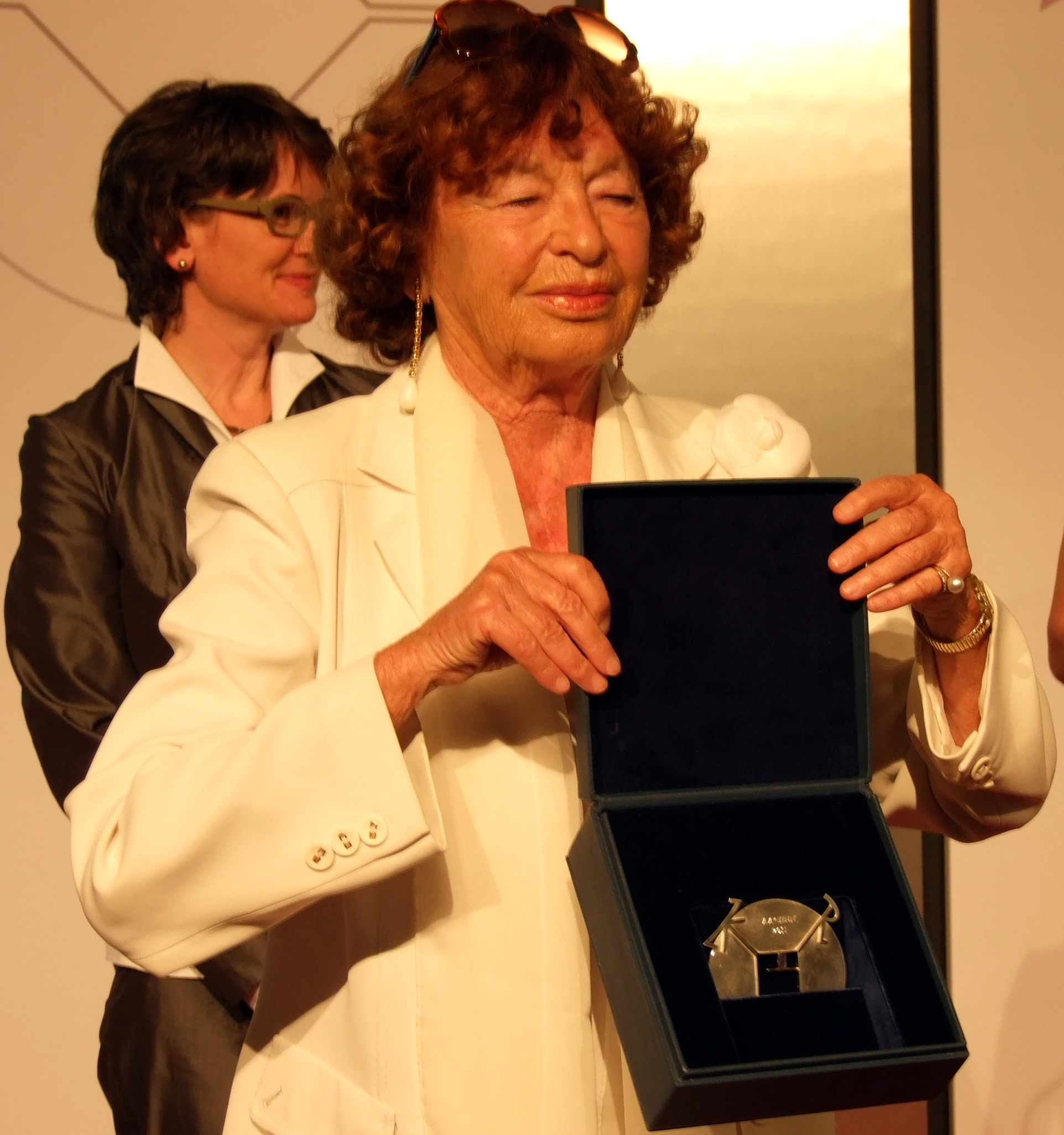 Inge Schönthal-Feltrinelli bekommt die Karlsmedaille für europäische Medien verliehen.